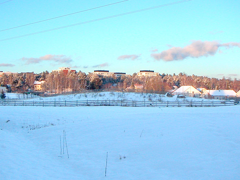 Turun Kuralan Hannunniitu lumipeitteessä